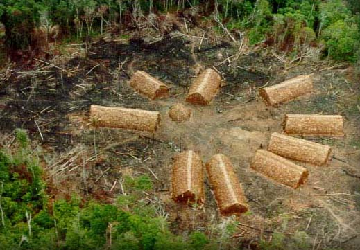 Os Enawenê-Nawê (MT), grupo da família lingüística Aruaque, vivem em aldeias formadas por grandes casas retangulares e uma casa circular, localizada mais ou menos no centro, onde ficam guardadas as suas flautas. No pátio central, são realizados diversos rituais e jogos.